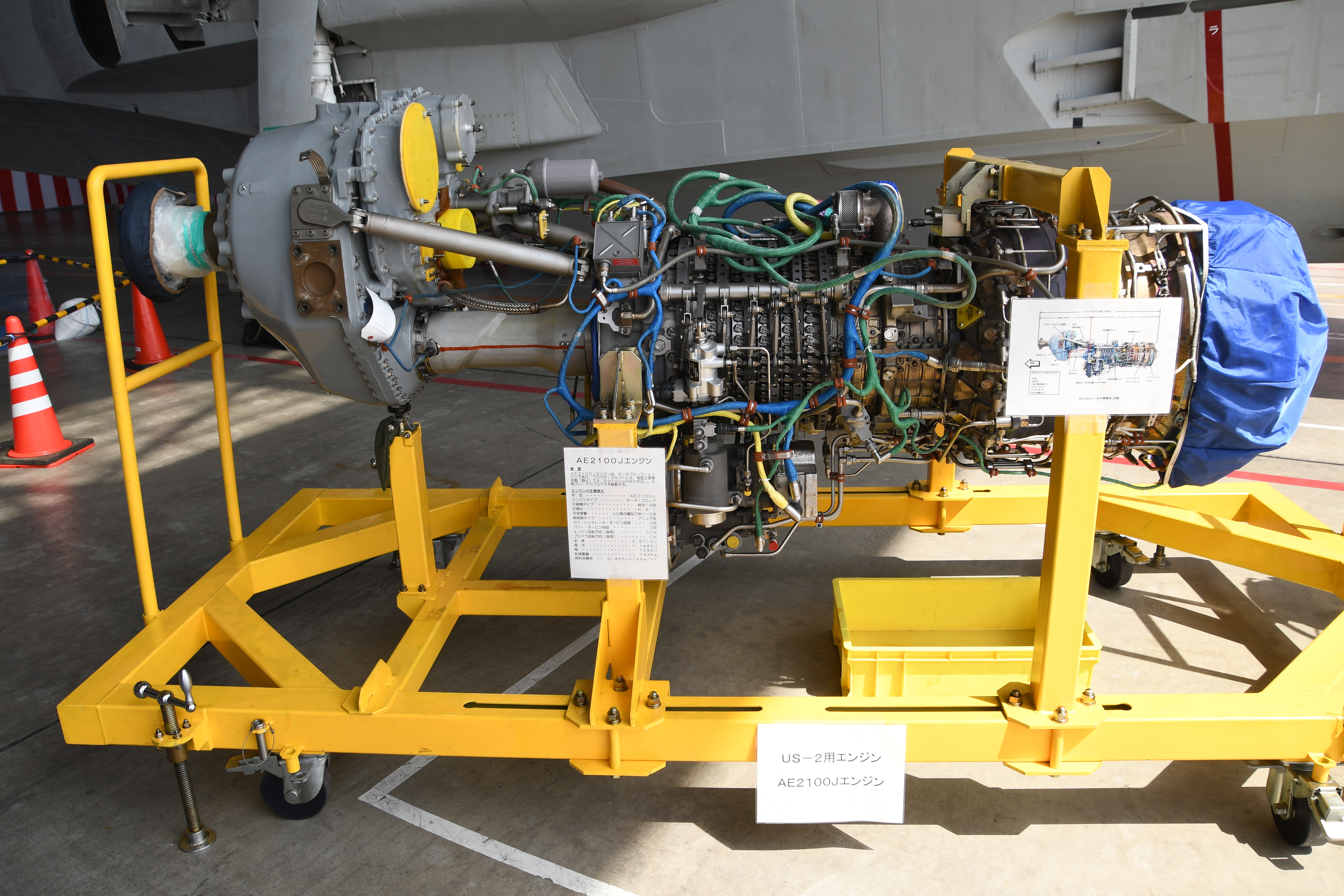 海上自衛隊 US-2用AE2100Jターボプロップ・エンジン 左側面。2019年5月5日 米海兵隊岩国航空基地にて。